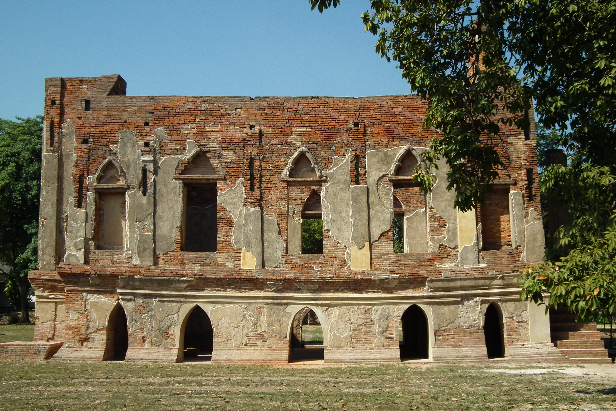 พระตำหนักคำหยาด(พระที่นั่งคำหยาด)